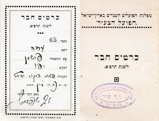 כרטיס חבר של עדה פישמן במפלגת הפועל הצעיר תרפ"א, 1921